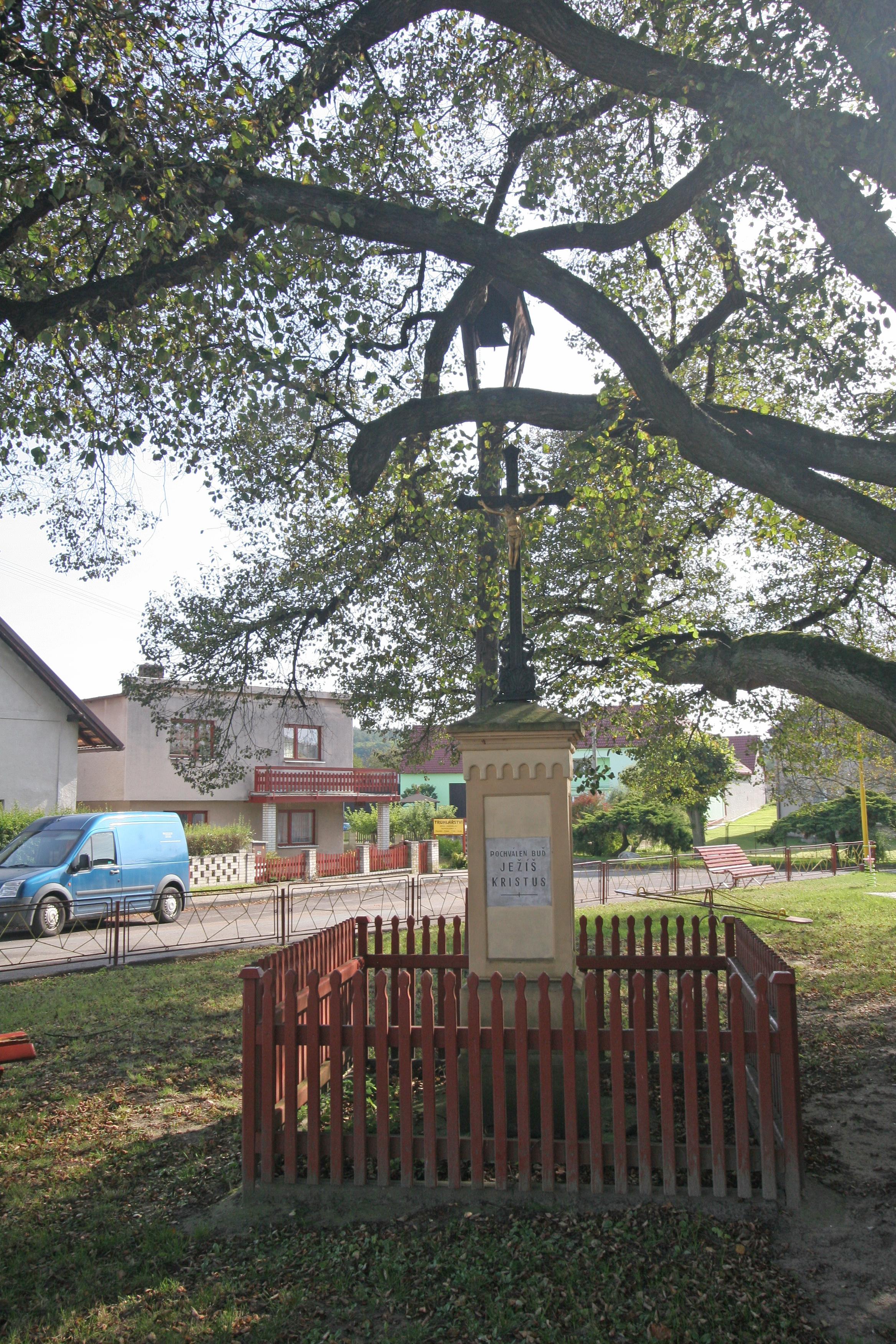 Sovolusky křížek